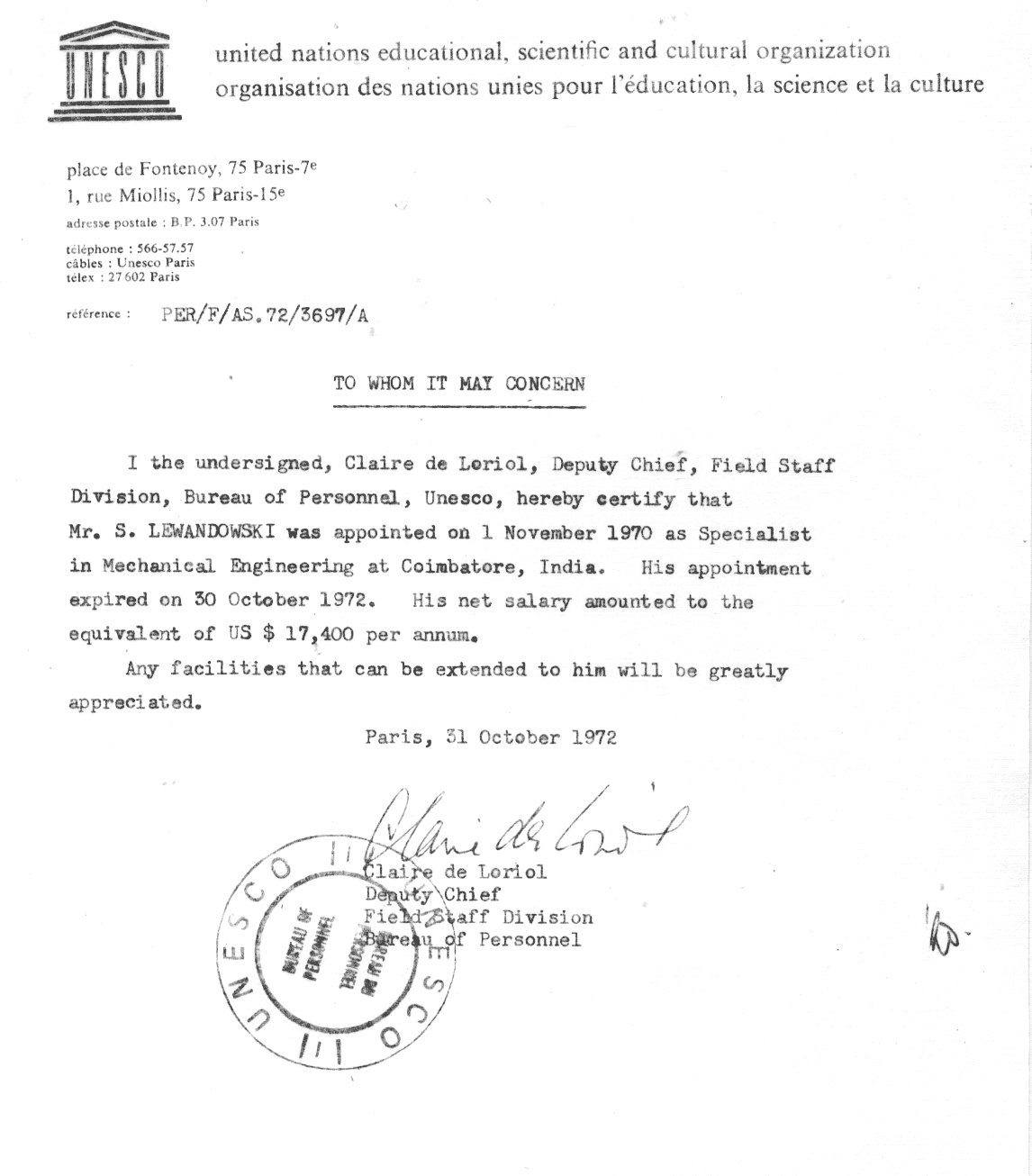 Poświadczenie przcy eksperta w UNESCO